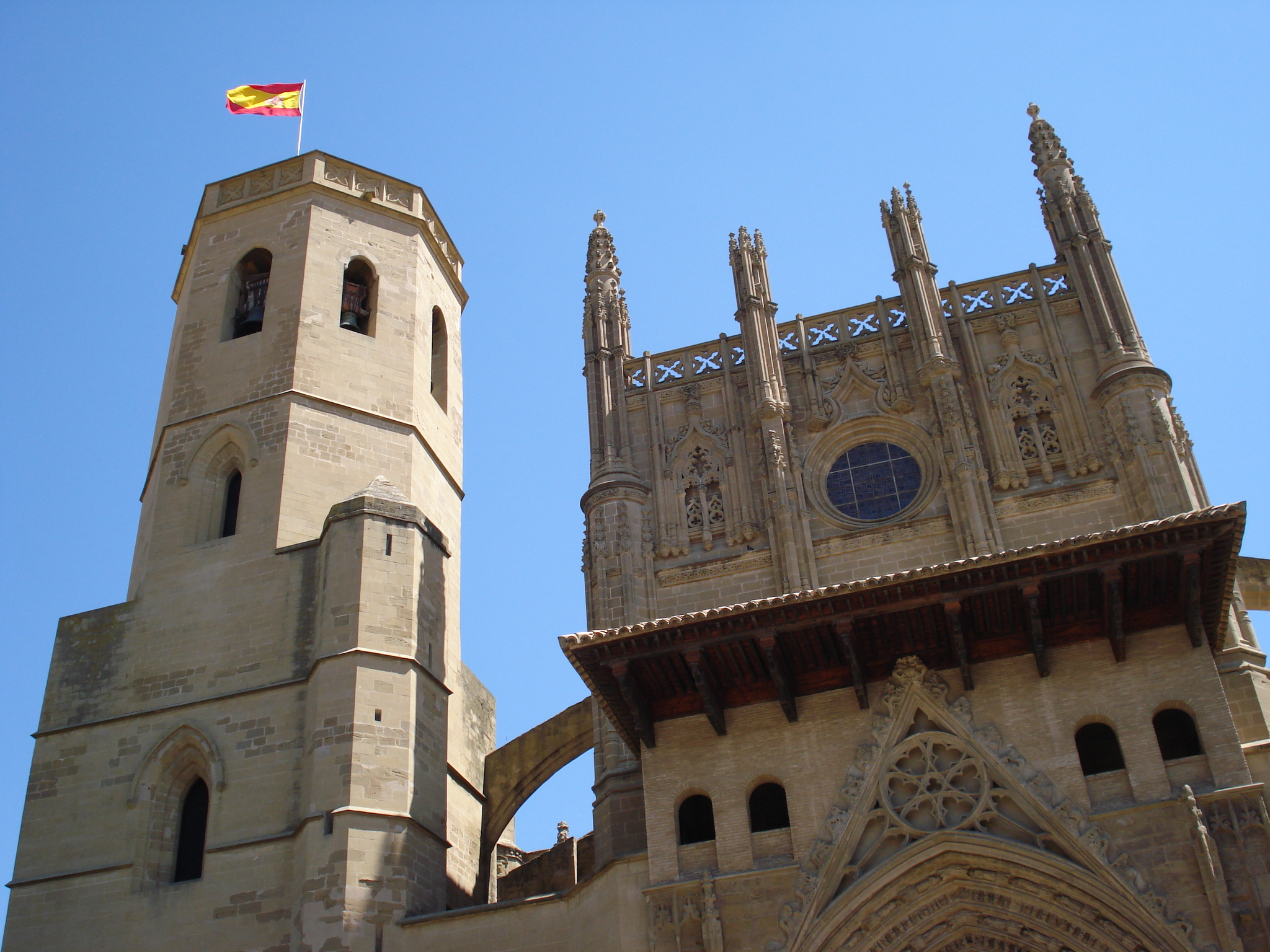 Catedral de Huesca na altura das festas de São Lourenço. Foto tirada por Sérgio Gomes.